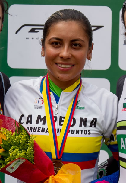 Lorena Colmenares Ganadora de Prueba por Puntos en Campeonato de Colombia de Pista 2016